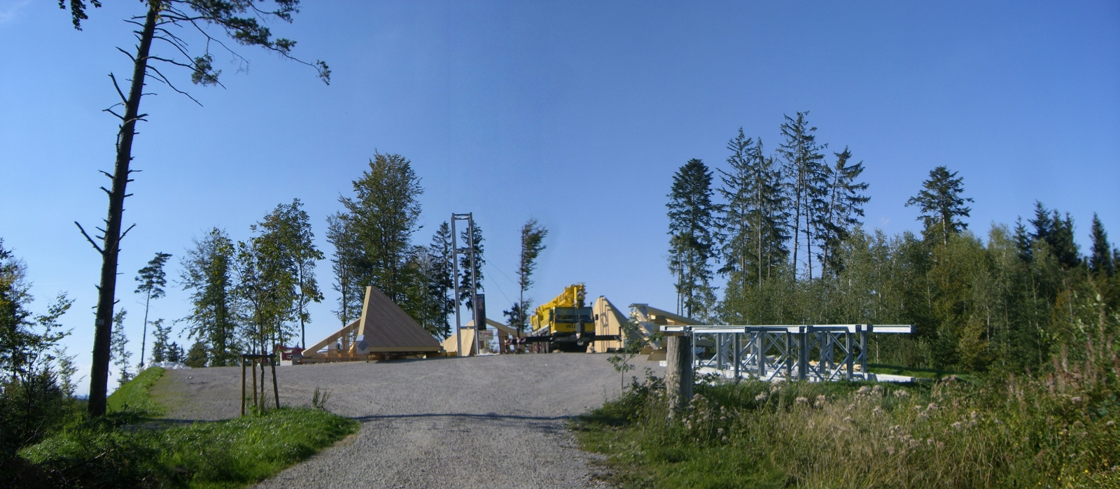 Aussichtsturm auf dem Altenberg (Altenbergturm) im Bau. Gut erkennbar ist die durch Aufschüttung verebnete Kuppe, auf der der Turm errichtet wurde. Blickrichtung nach Nordwesten.